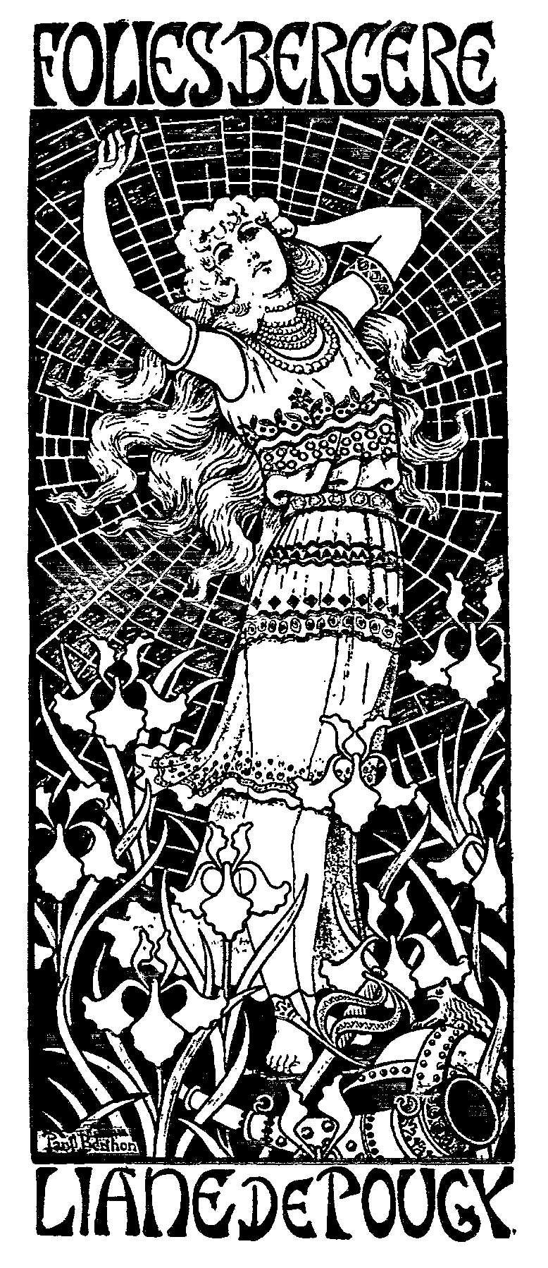 Liane de Pougy (1869-1950) aux Folies Bergère par Paul Berthon ((1872-1909) Affiche pour L'Araignée d'Or de Jean Lorrain